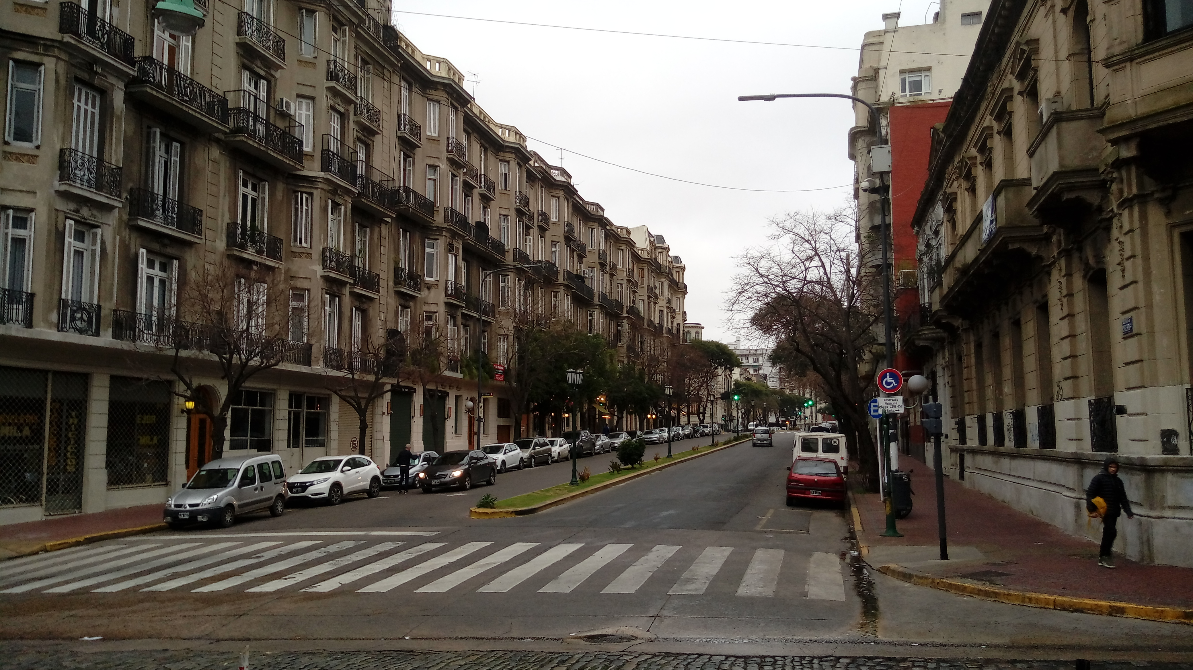 Inicio de la Avenida Caseros, en su intersección con Defensa, en San Telmo. A la izquierda se aprecia el conjunto Caseros 410-90, obra del arquitecto suizo-argentino Christian Schindler (1859-1920) construida en 1910.